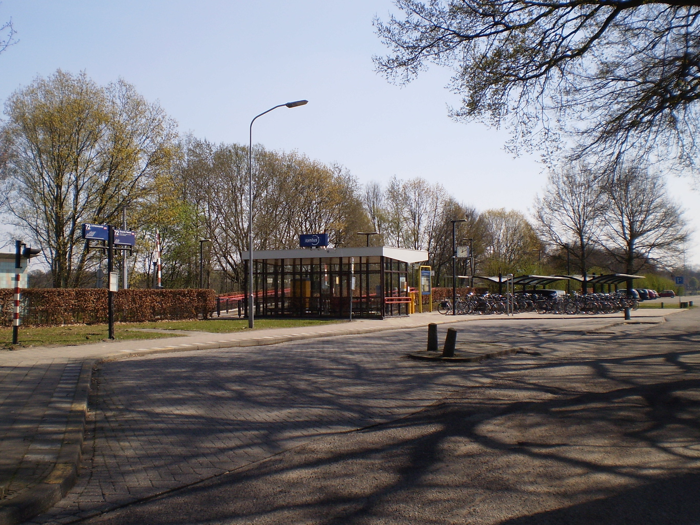 Station Lichtenvoorde-Groenlo, Lievelde, NL